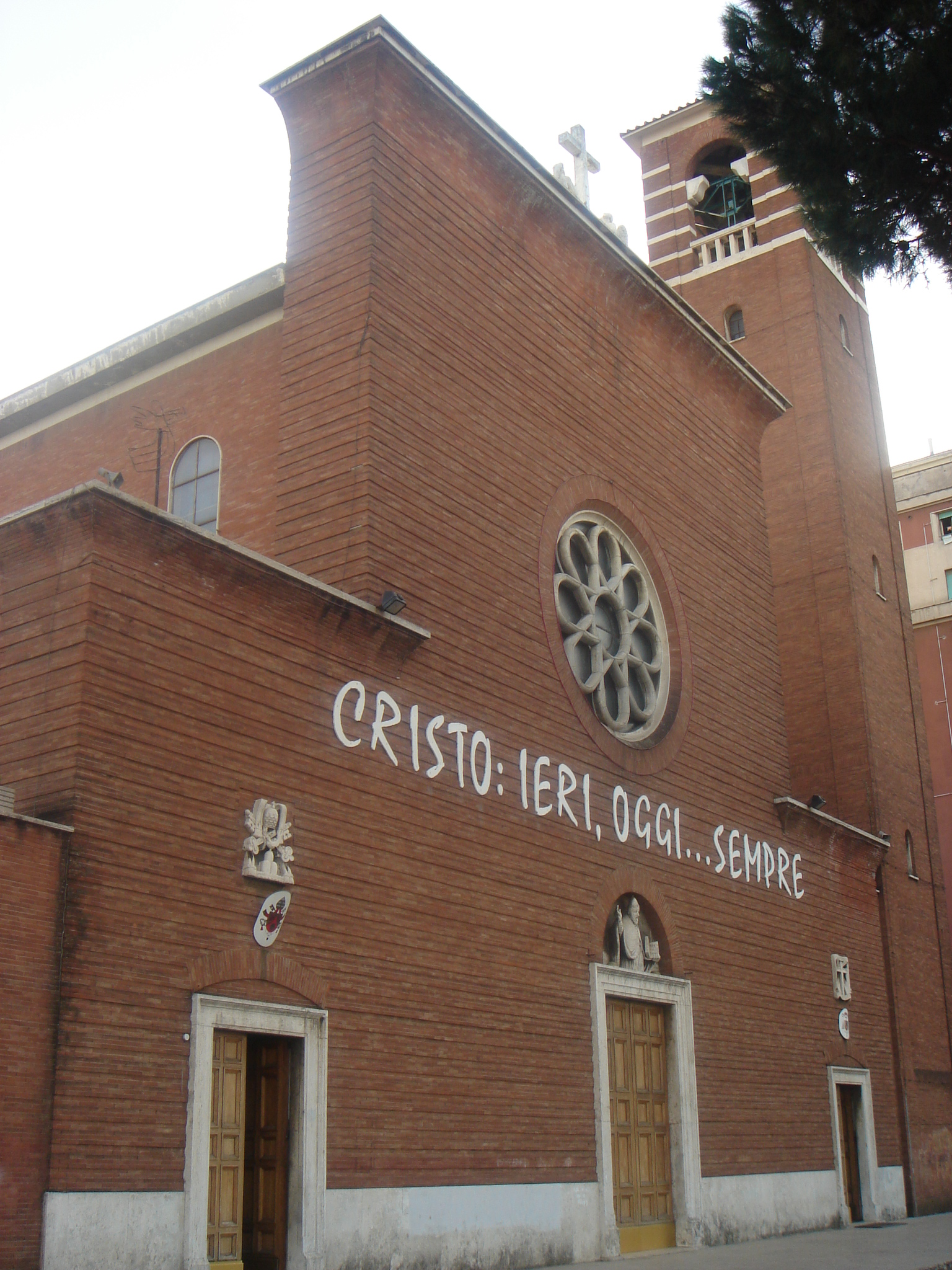 Roma, Prenestino: san Leone I